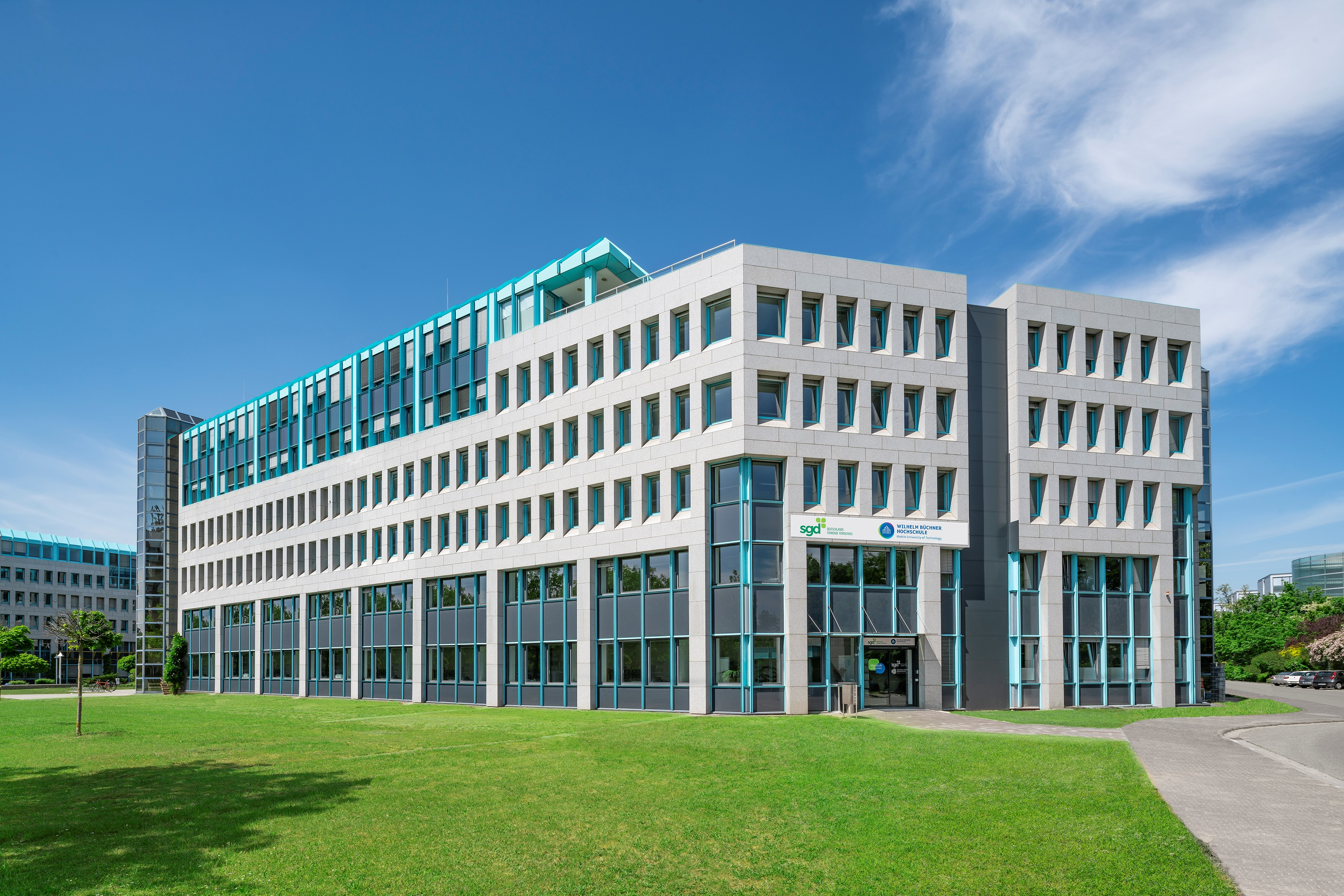 Firmensitz der Studiengemeinschaft Darmstadt in Darmstadt, Hilpertstraße 31